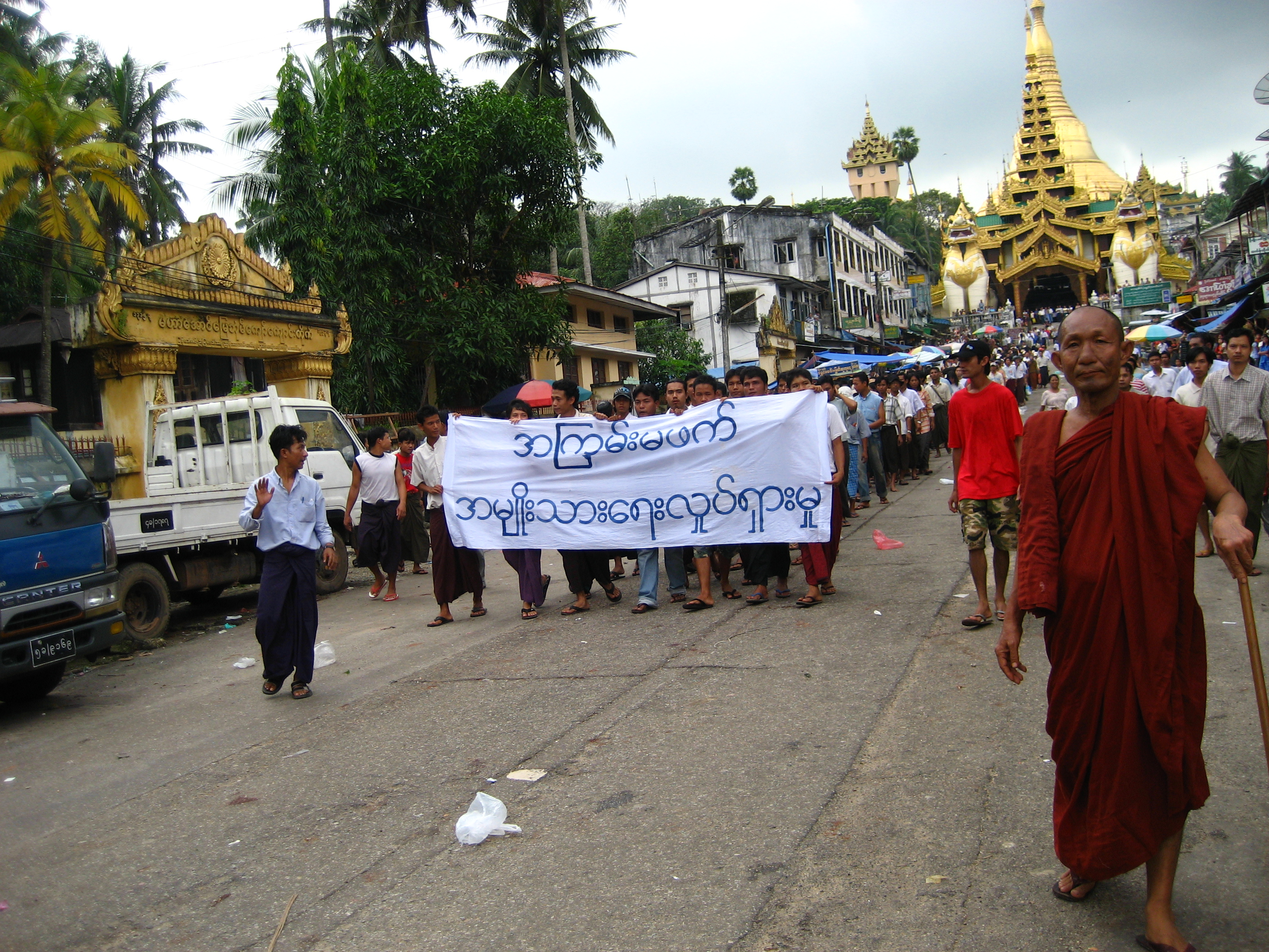 Monks Protesting in Burma (Rangoon, Shwedagon pagoda)